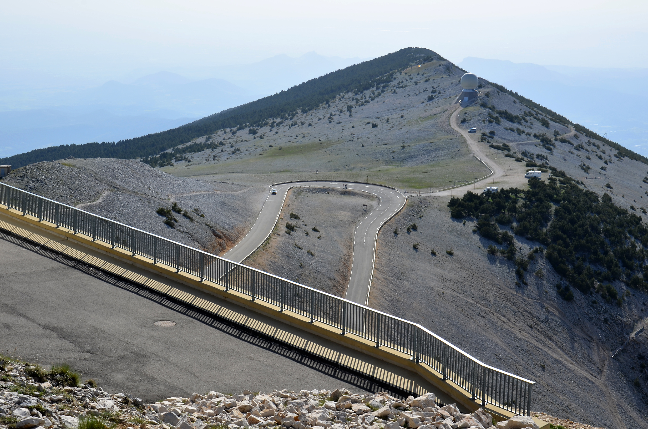 Mont Ventoux Gipfel